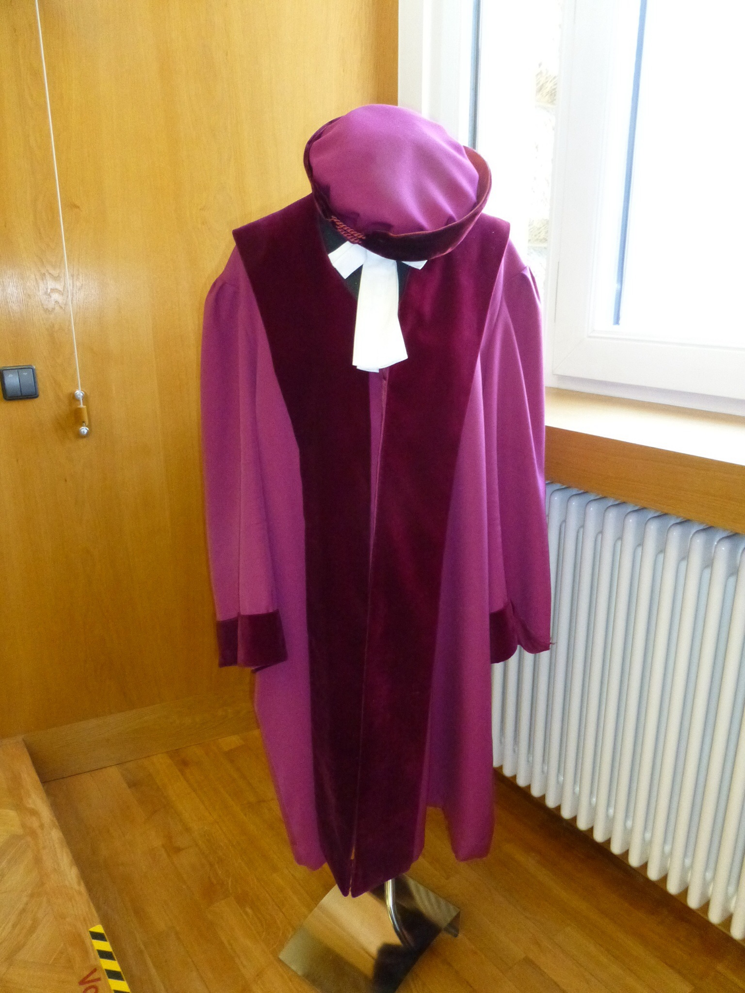 Amtstracht am Bundesverwaltungsgericht Leipzig